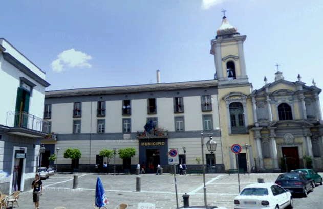 Foto scattata da me nell'Agosto scorso.